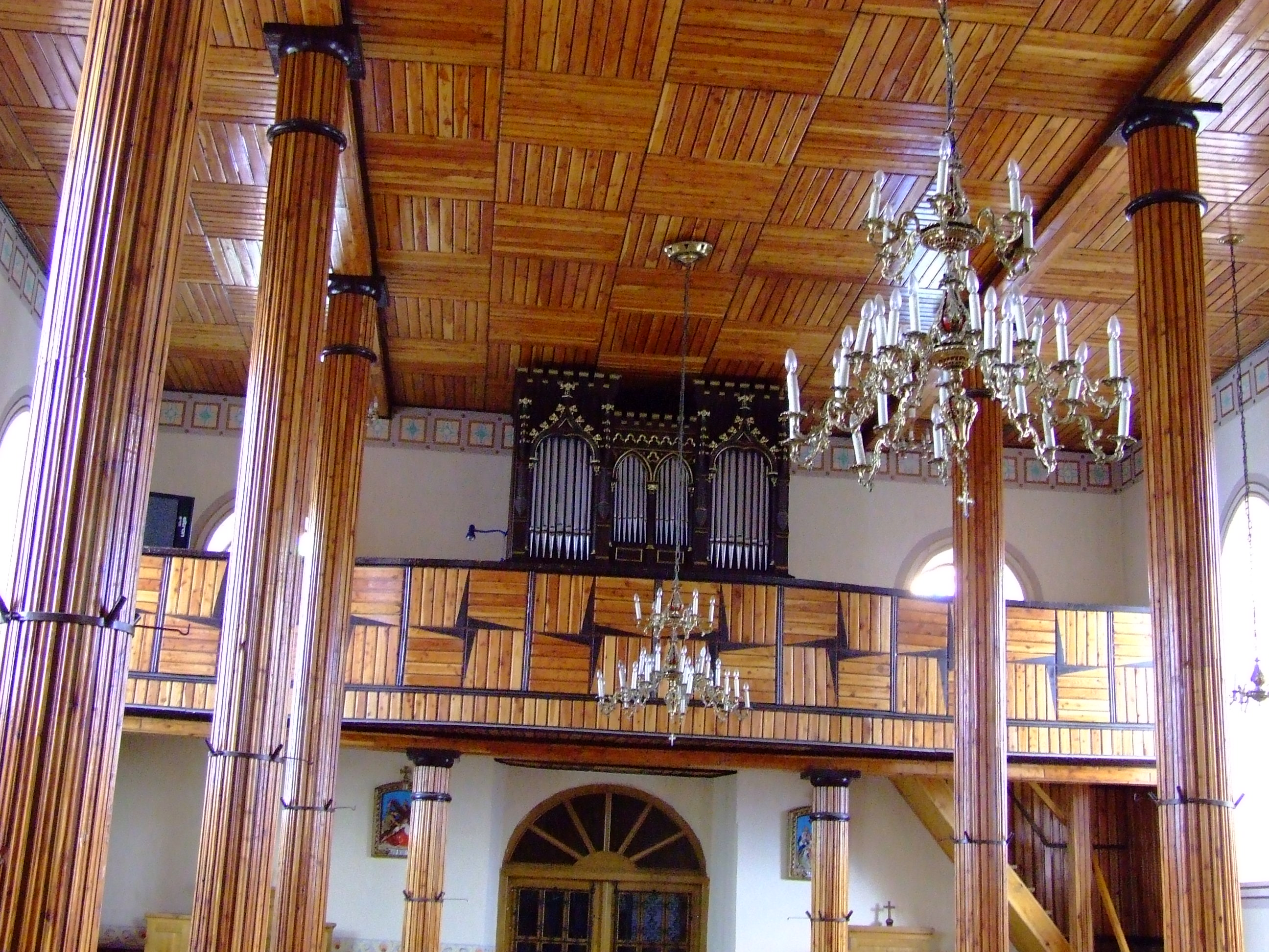 Szydłowo kościół